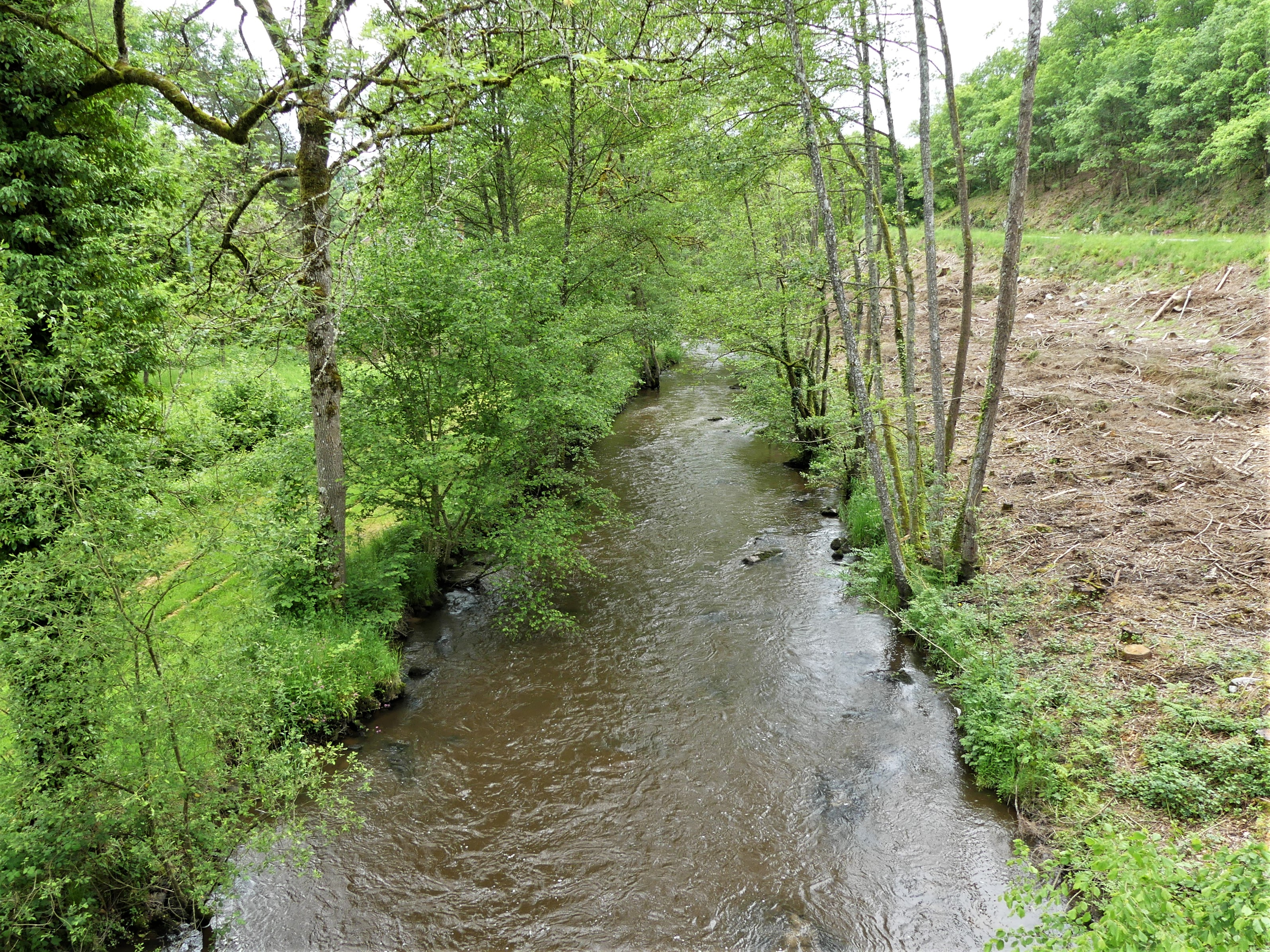 La Rozeille en amont du pont de la route départementale 19, Moutier-Rozeille, Creuse, France.